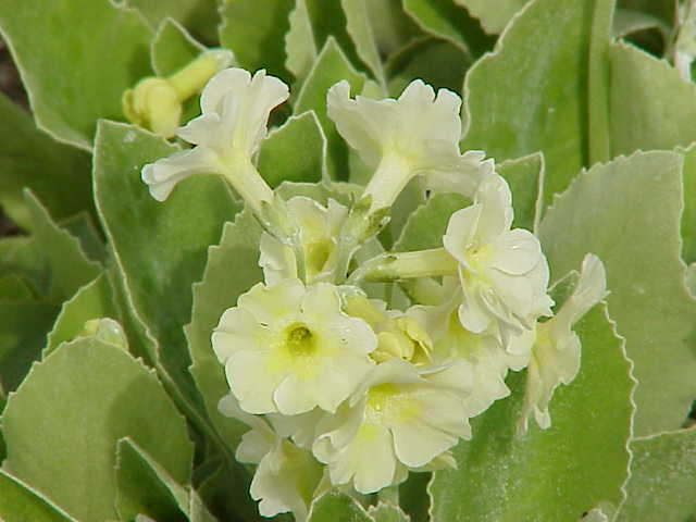 Species: Primula auricula Family: Primulaceae Image No. 1